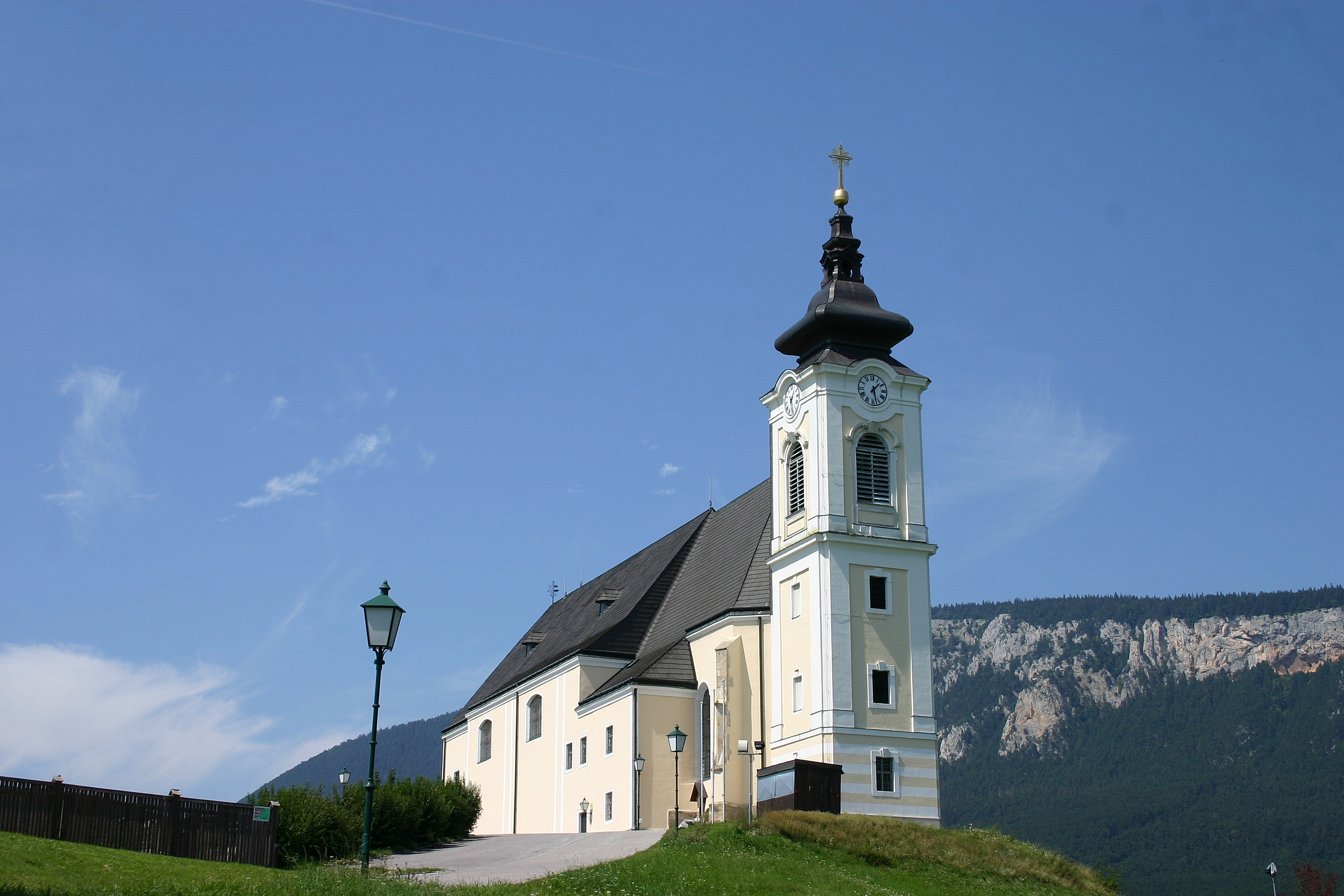 Höflein an der Hohen Wand Wallfahrtskirche Maria Kirchbüchl (Bild 1) in Unterhöflein